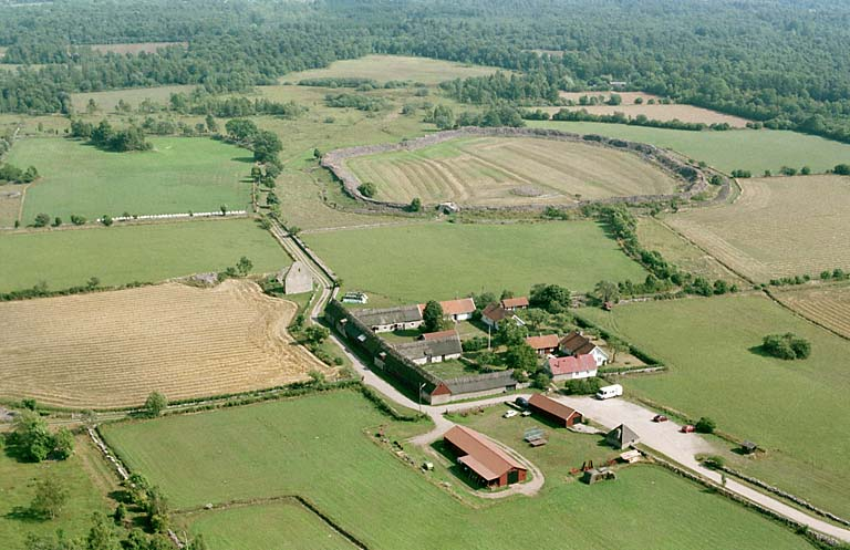 Gråborg mot OSO. Motiv: Gråborg Nyckelord: Flygbilder, Riksintressen Kategori: Slättbygd, Fornborg Gråborg mot OSO.